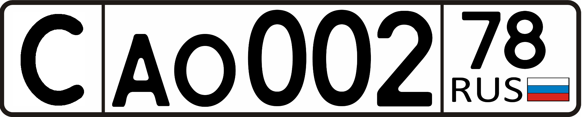 Номерной знак спортивных автомобилей